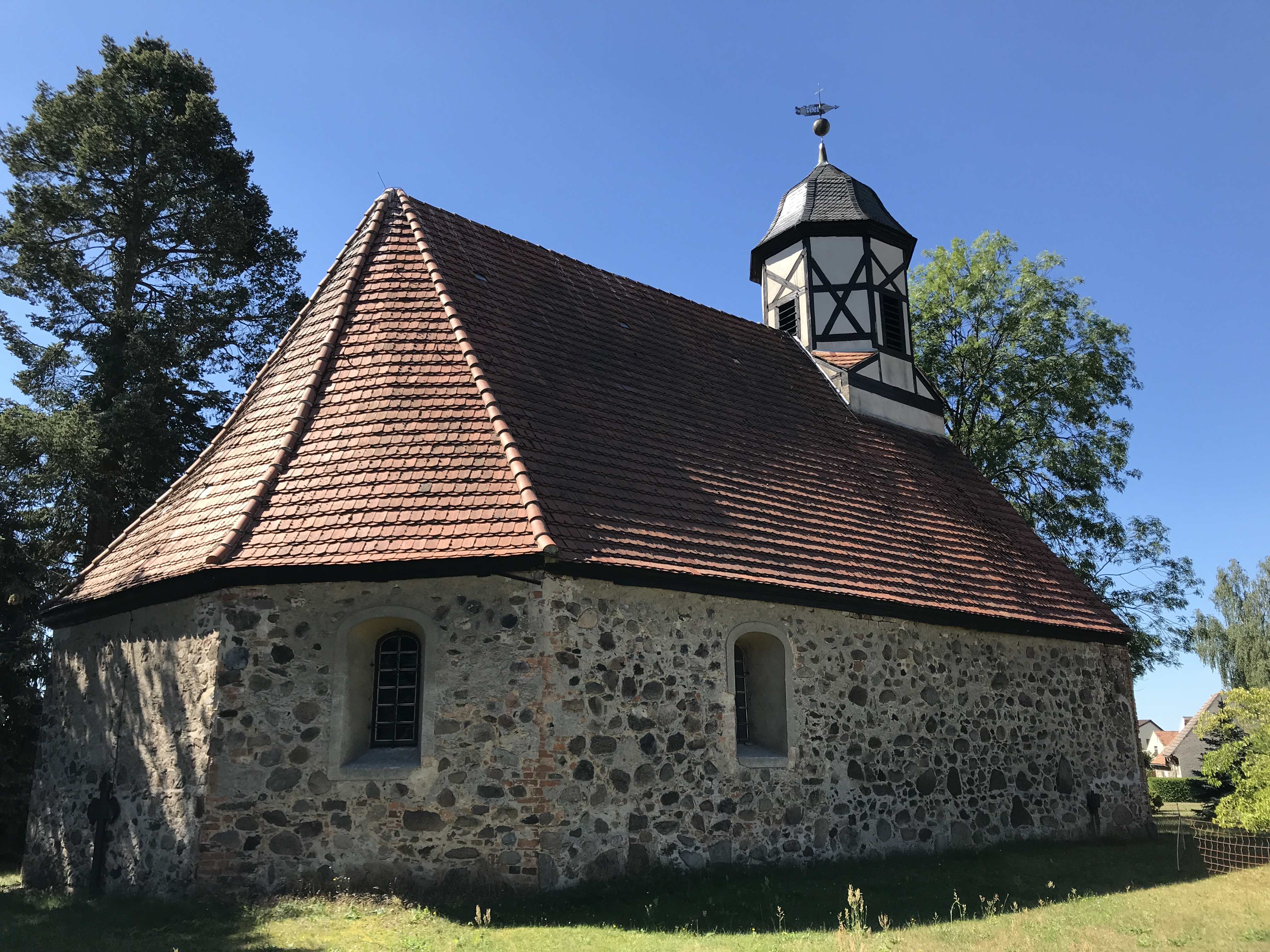 Die Dorfkirche Großkrausnik ist eine Feldsteinkirche aus der Zeit um 1400 in Sonnewalde, einer Stadt im Landkreis Elbe-Elster. Im Innern steht unter anderem ein Altarretabel aus der Zeit um 1700.